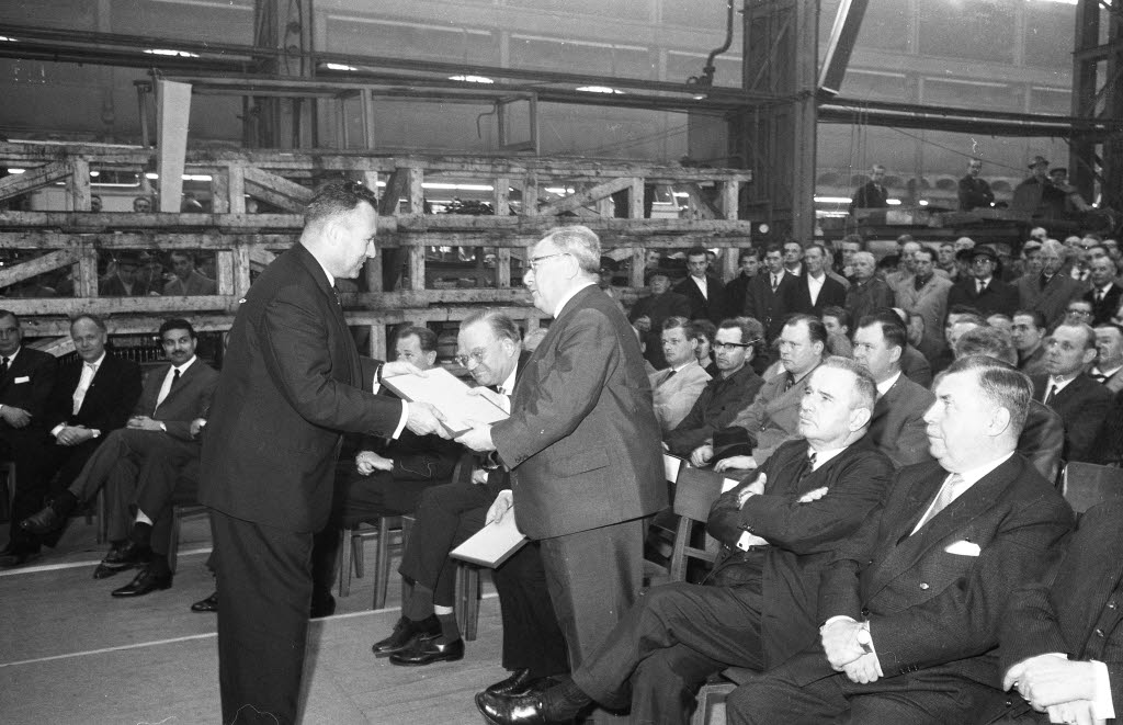 Auslieferung der 1000. und 1001. Diesellokomotive. Im Bild überreicht MaK-Direktor Raue (links) an den Präsidenten Georg Wopfner vom Bundesbahnzentralamt München einen Erinnerungsband (3.v.r.). Im Bild rechts in der ersten Reihe MaK-Eigentümer Hugo Stinnes (2.v.r.) und Amtschef des Landeswirtschaftsministerium Ministerialdirektor Firtz Sureth (1.v.r.).